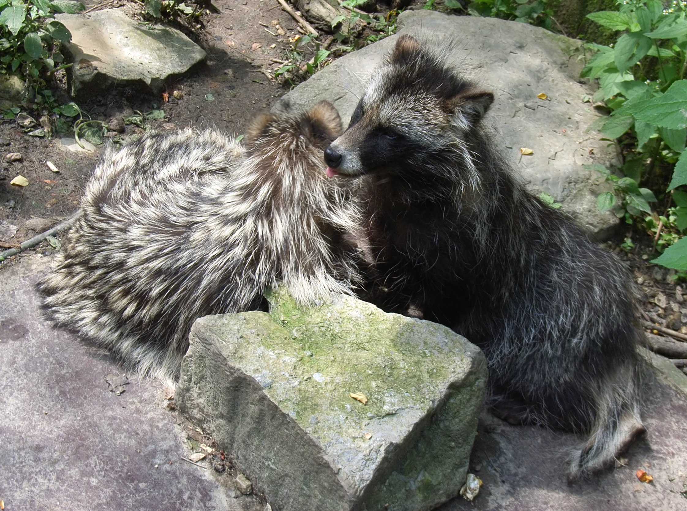 Nyctereutes procyonoides